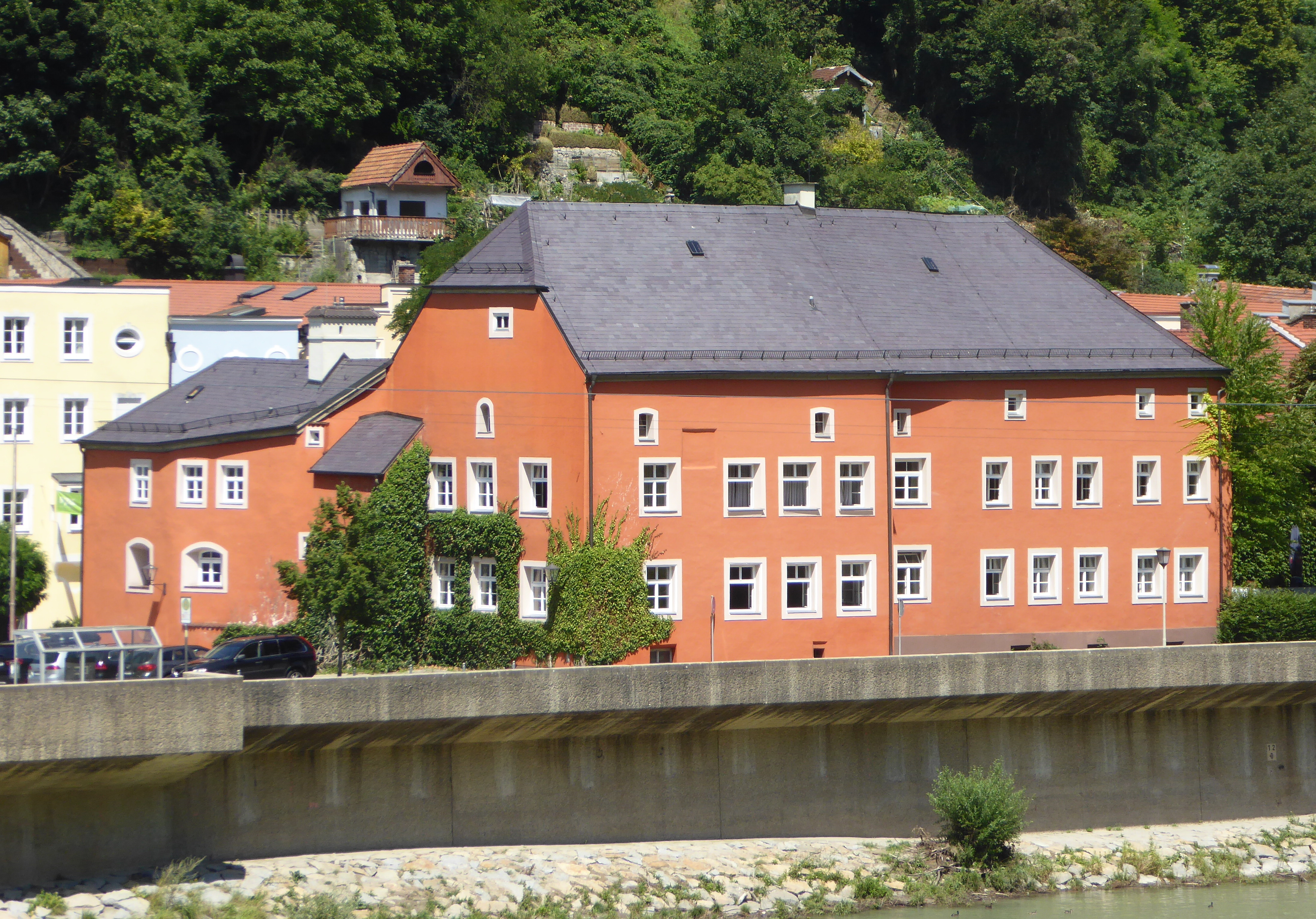 Das Mautnerschloss in Burghausen, von Österreich aus gesehen.